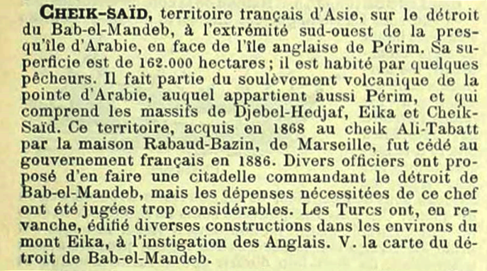 Entrée sur Cheik-Saïd dans la première édition du Nouveau Larousse illustré en sept tomes (1897-1904).